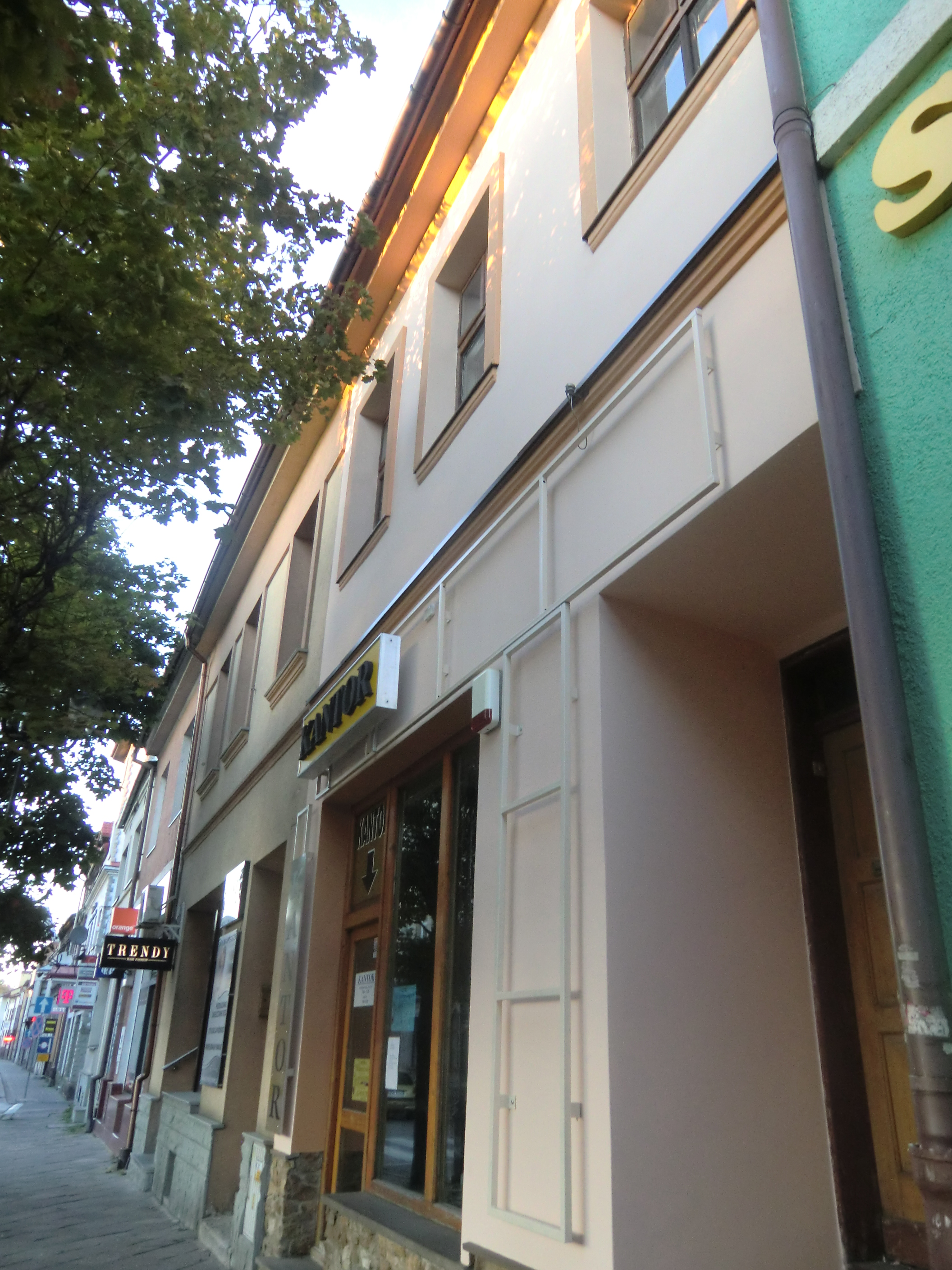 Budynek Żywiec, Rynek 4, Żywiec